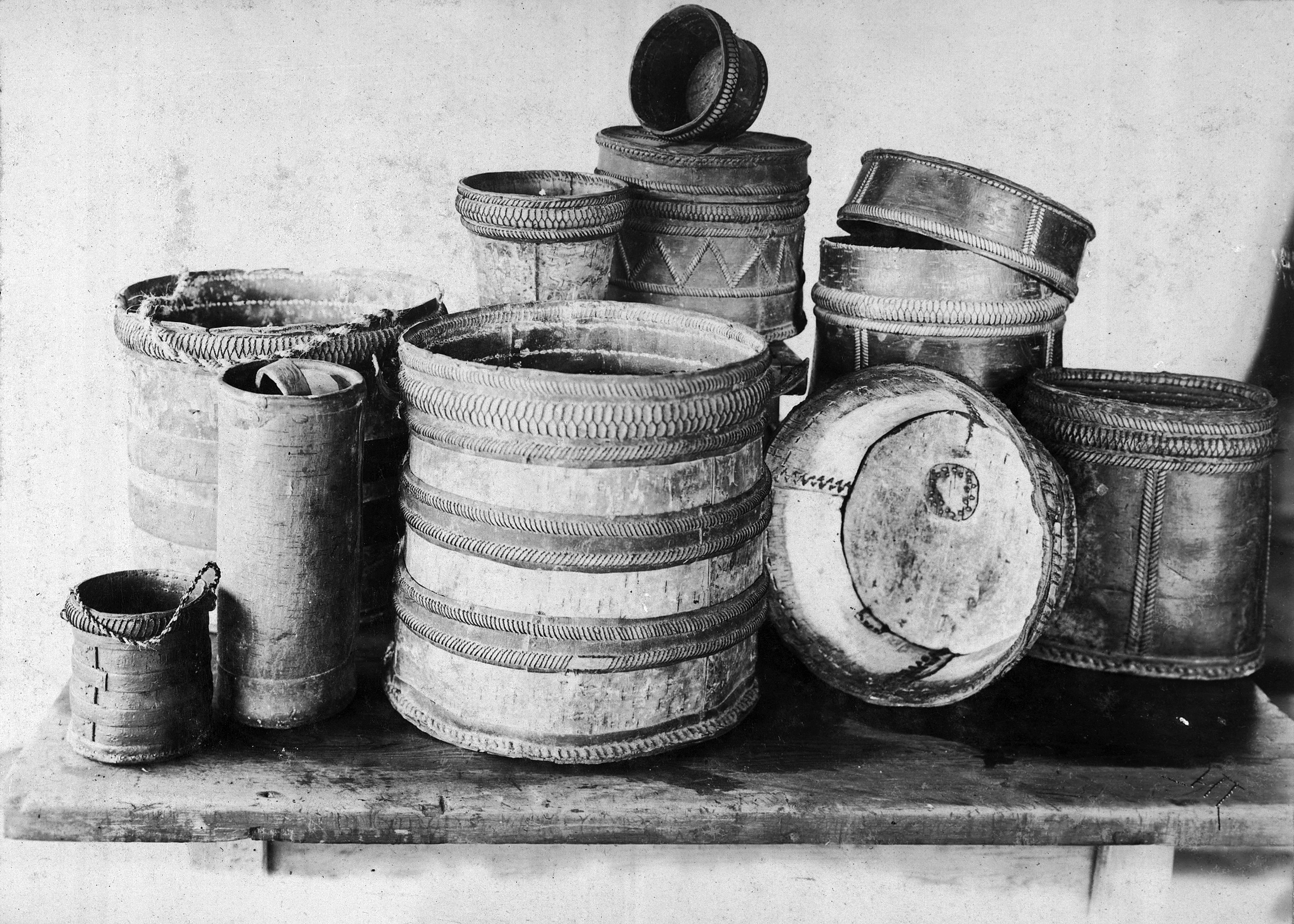 Якутская традиционная посуда.